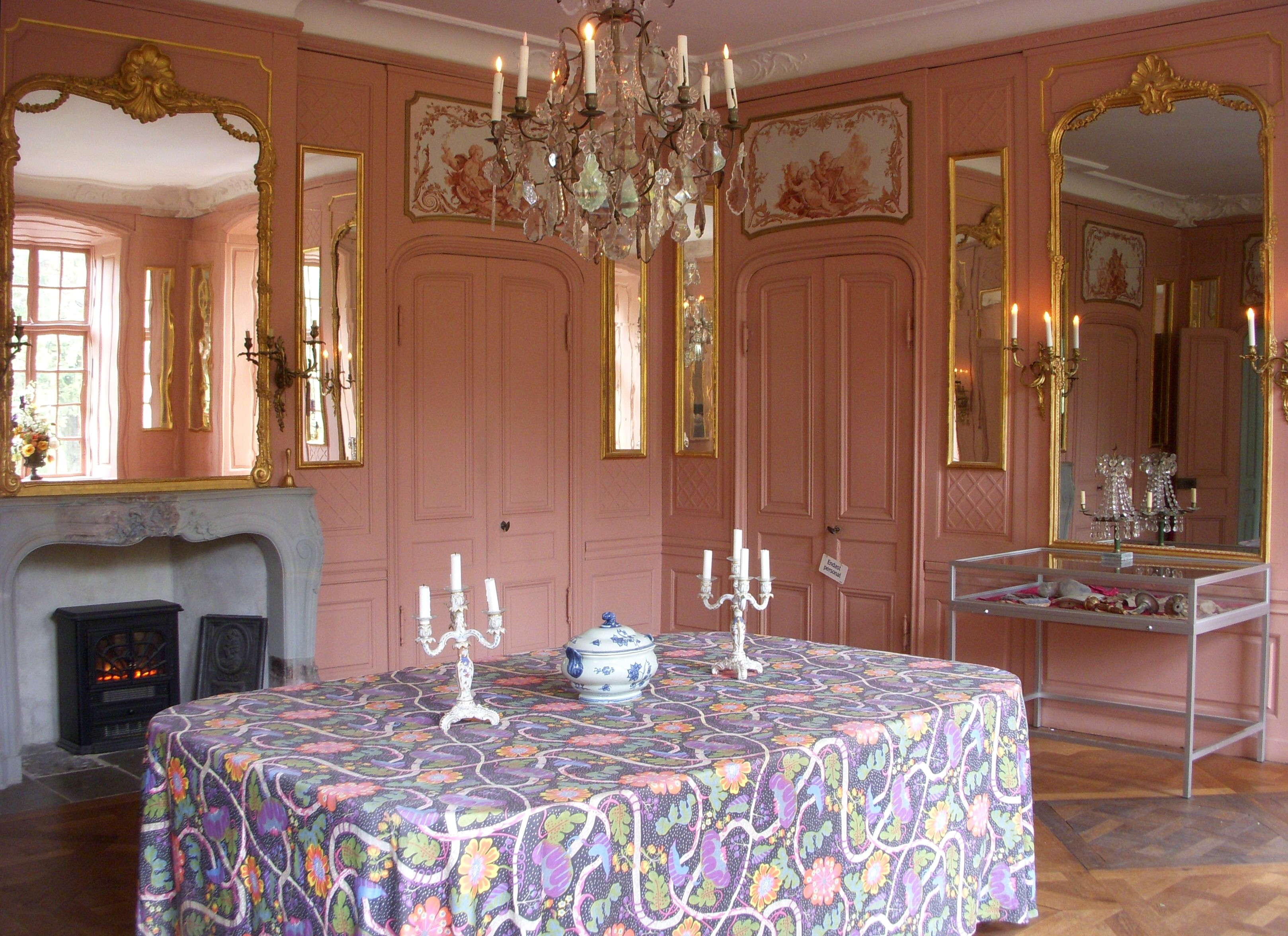 Matsalen, Confidencen Ulriksdal